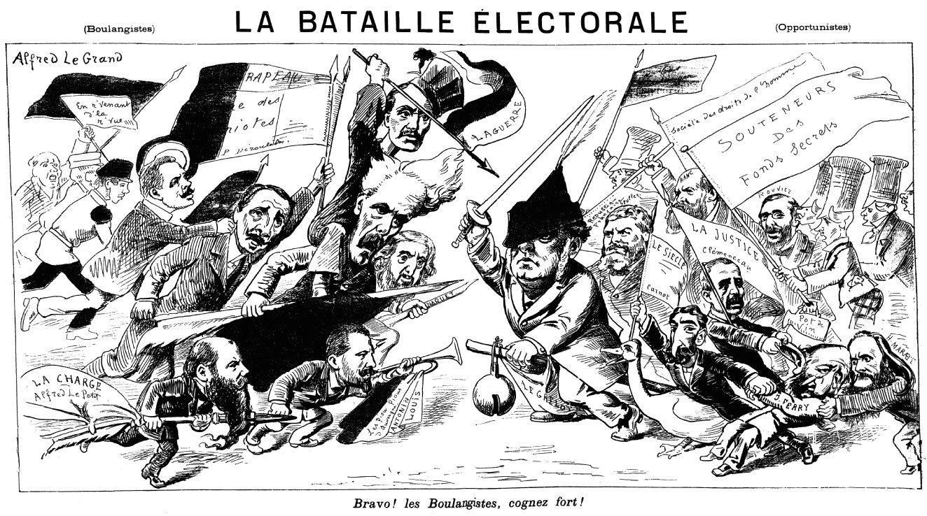 "La bataille électorale".